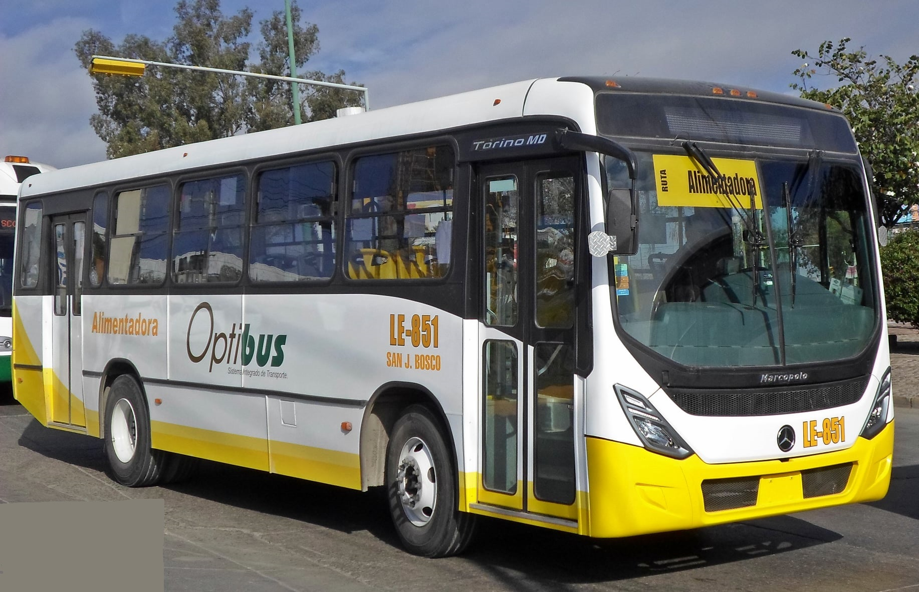 magen, la cual se trata de la nueva unidad LE-851 de la línea San Juan Bosco. Cabe destacar que esta empresa recibió un total de 4 autobuses modelo Torino MD, los cuales cubren los ECO´S LE-837, LE-845, LE-847 y LE-851.